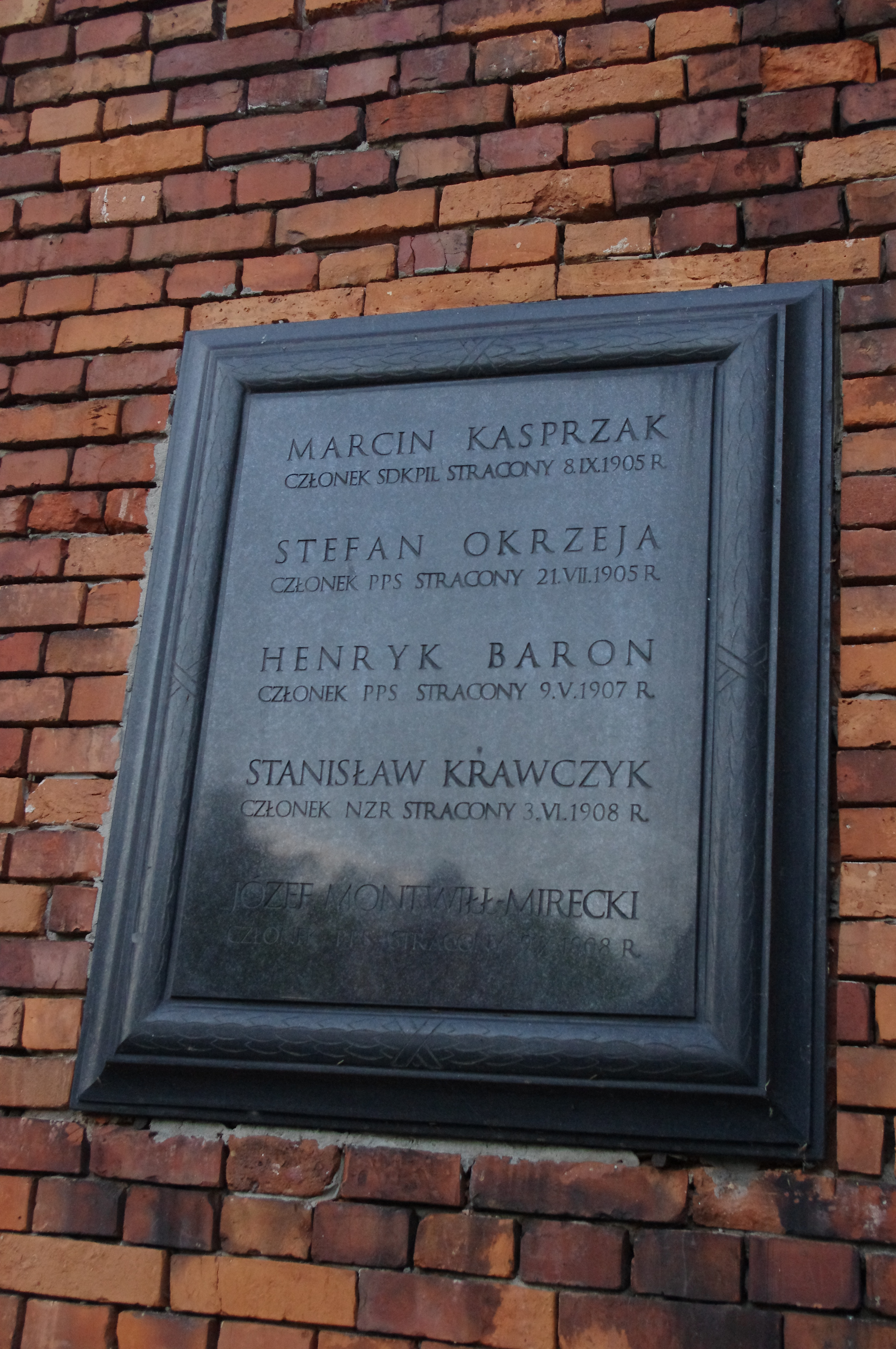 Tablica wmurowana w ścianę Cytadeli Warszawskiej tuż za szczątkami szubienicy, na której w okresie zaborów ginęli bojownicy o wyzwolenie narodowe i przemiany społeczne. Tablica upamiętnia wybitnych działaczy niepodległościowych i robotniczych straconych w Cytadeli podczas rewolucji 1905-1907: członka SDKPiL - Marcina Kasprzaka (stracony 8 września 1905), bojowca PPS – Stefana Okrzeje (stracony 21 lipca 1905), bojowca PPS – Henryka Barona (stracony 9 maja 1907), bojowca Narodowego Związku Robotniczego – Stanisława Krawczyka (stracony 3 czerwca 1908) i bojowca PPS - Józefa Montwiłł-Mireckiego (stracony 9 października 1908)